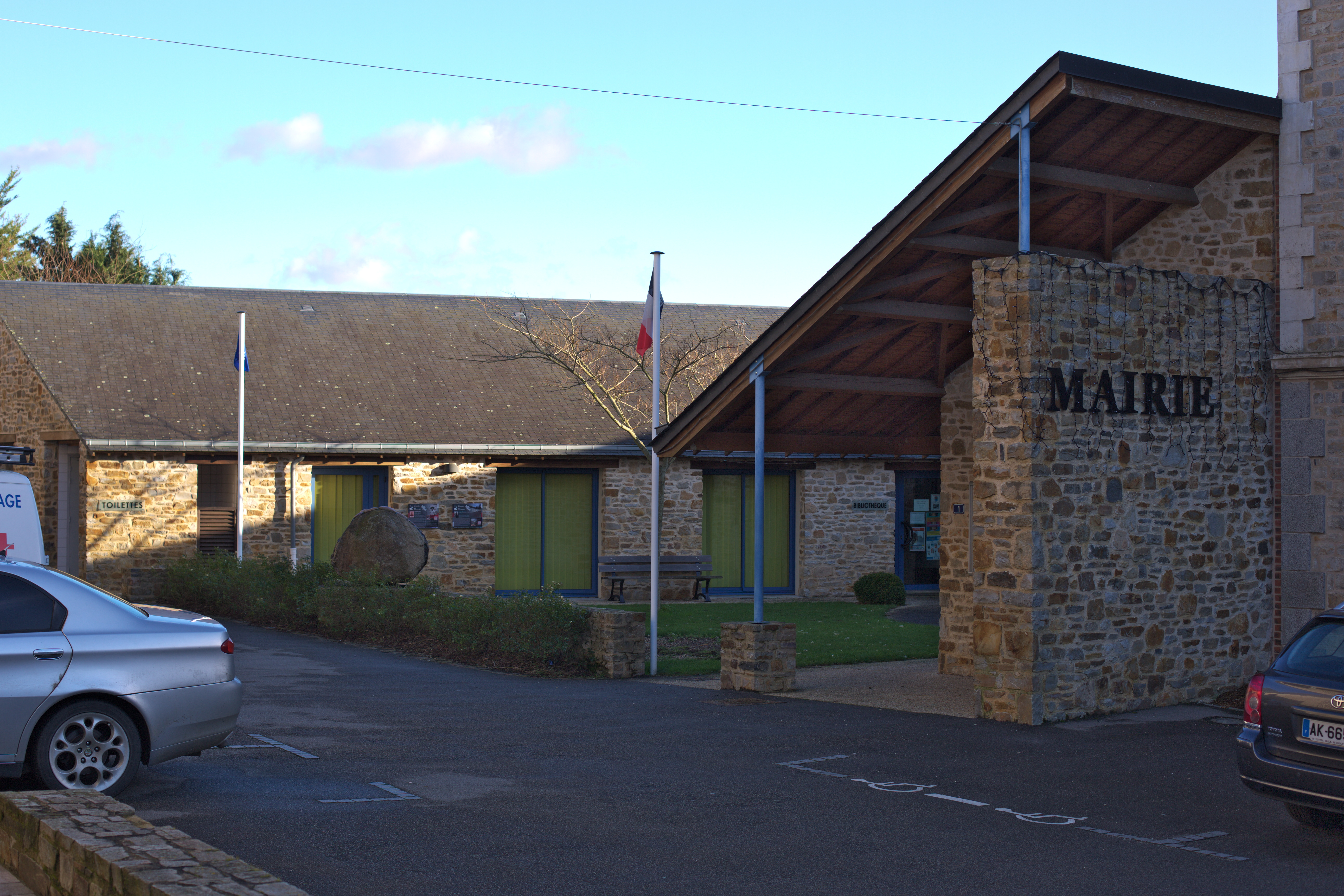 Mairie de Thourie.